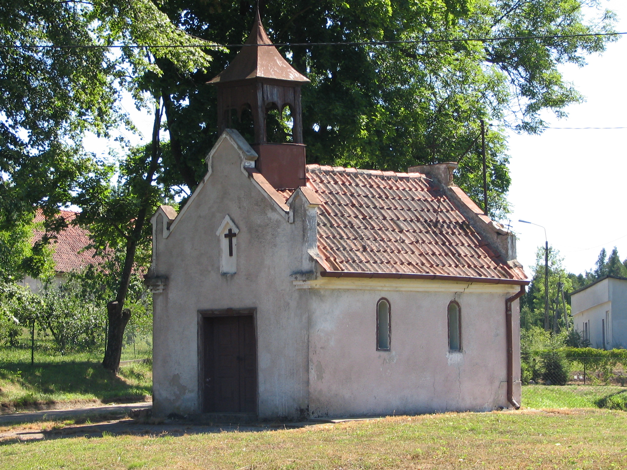 chapel in Markajmy near Lidzbark Warminski / kaplica w Markajmach